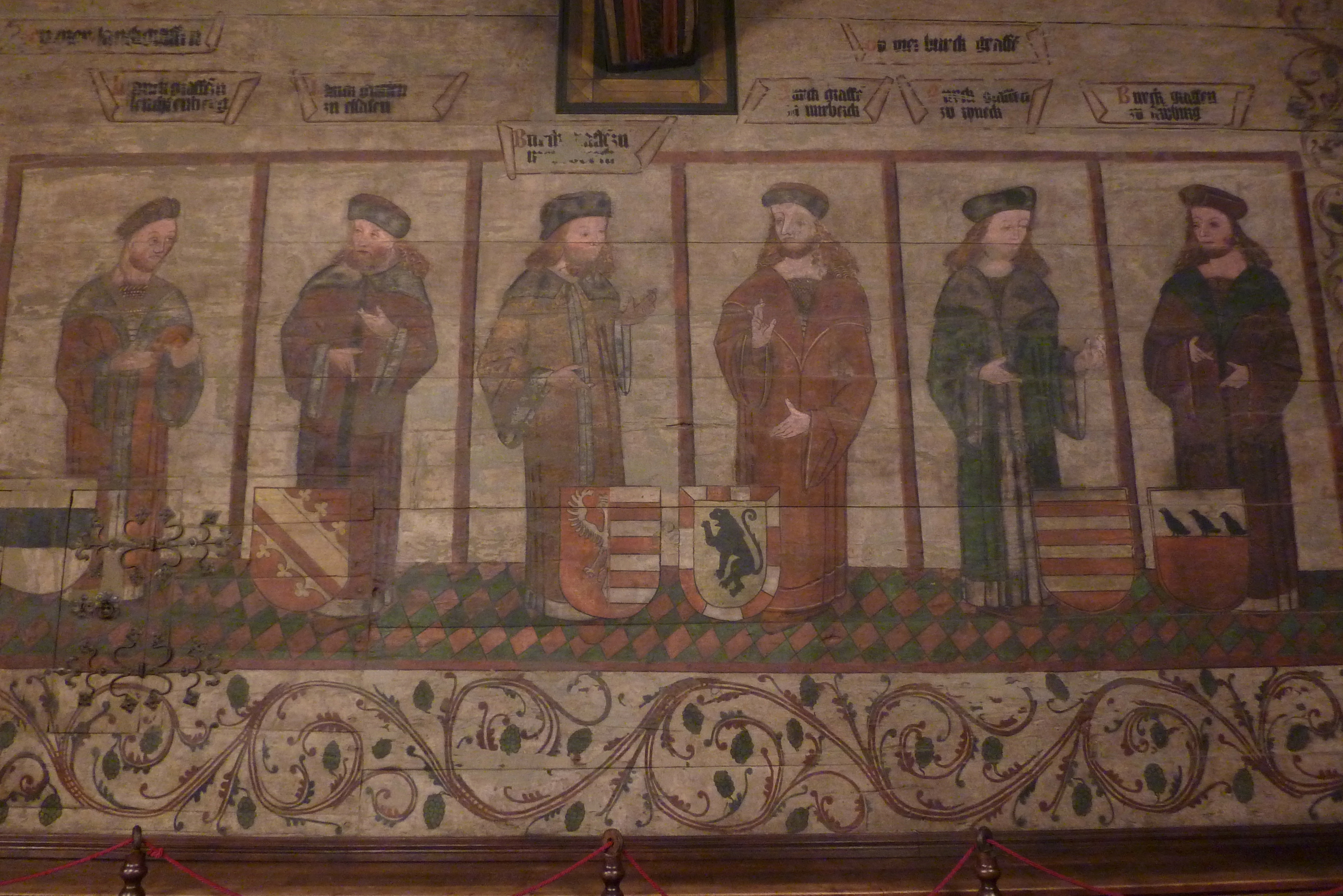 Große Ratsstube des Rathauses in Mühlhausen/Thüringen, spätgotische Wandmalerei auf Holzbohlen, Darstellung: Landgrafen zu Leuchtenberg und Elsass, Burggrafen zu Magdeburg, Nürnberg, Rheineck und Strassburg, mit Inschriften und Wappen